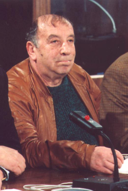 Международная Леонардо-премия